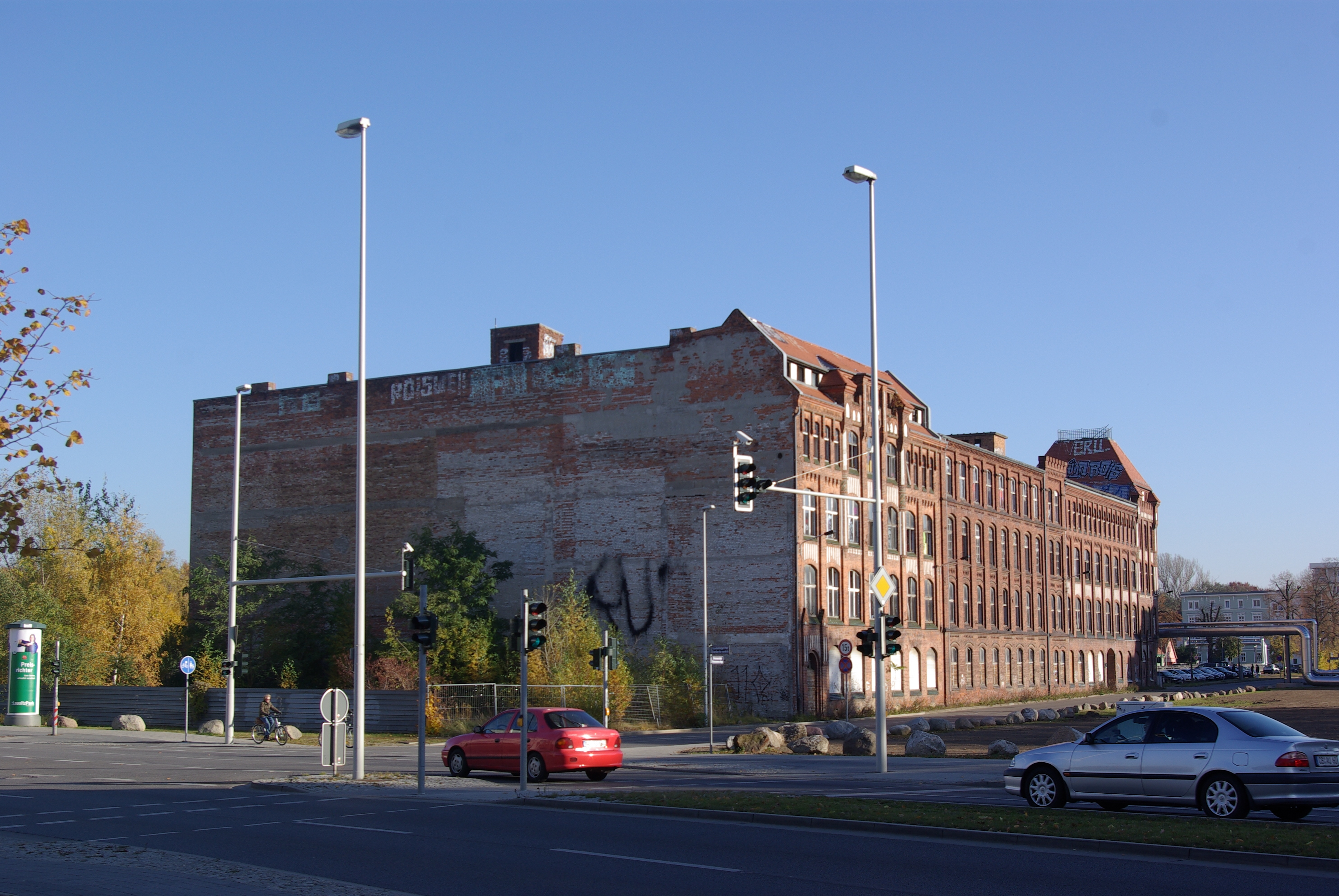 Cottbus in Brandenburg. Das Gebäude Briesemannstraße 2 steht unter Denkmalschutz. Gegründet wurde das Gebäude 1890 von Viktor Sterz, erweitert wurde es in den Jahren 1908 und 1922/23.